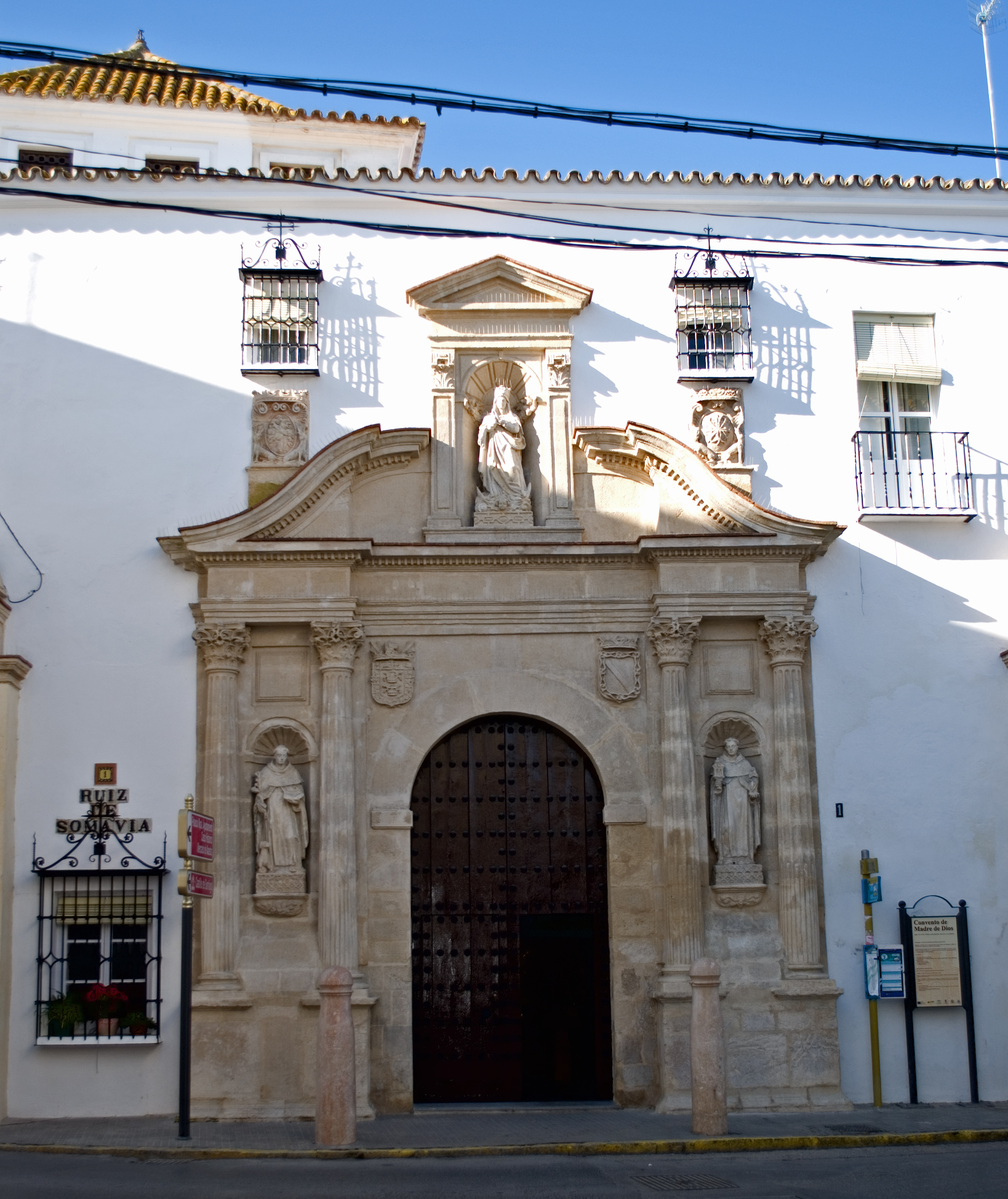 Fachada del Convento de Madre de Dios, Sanlúcar de Barrameda (Cádiz)